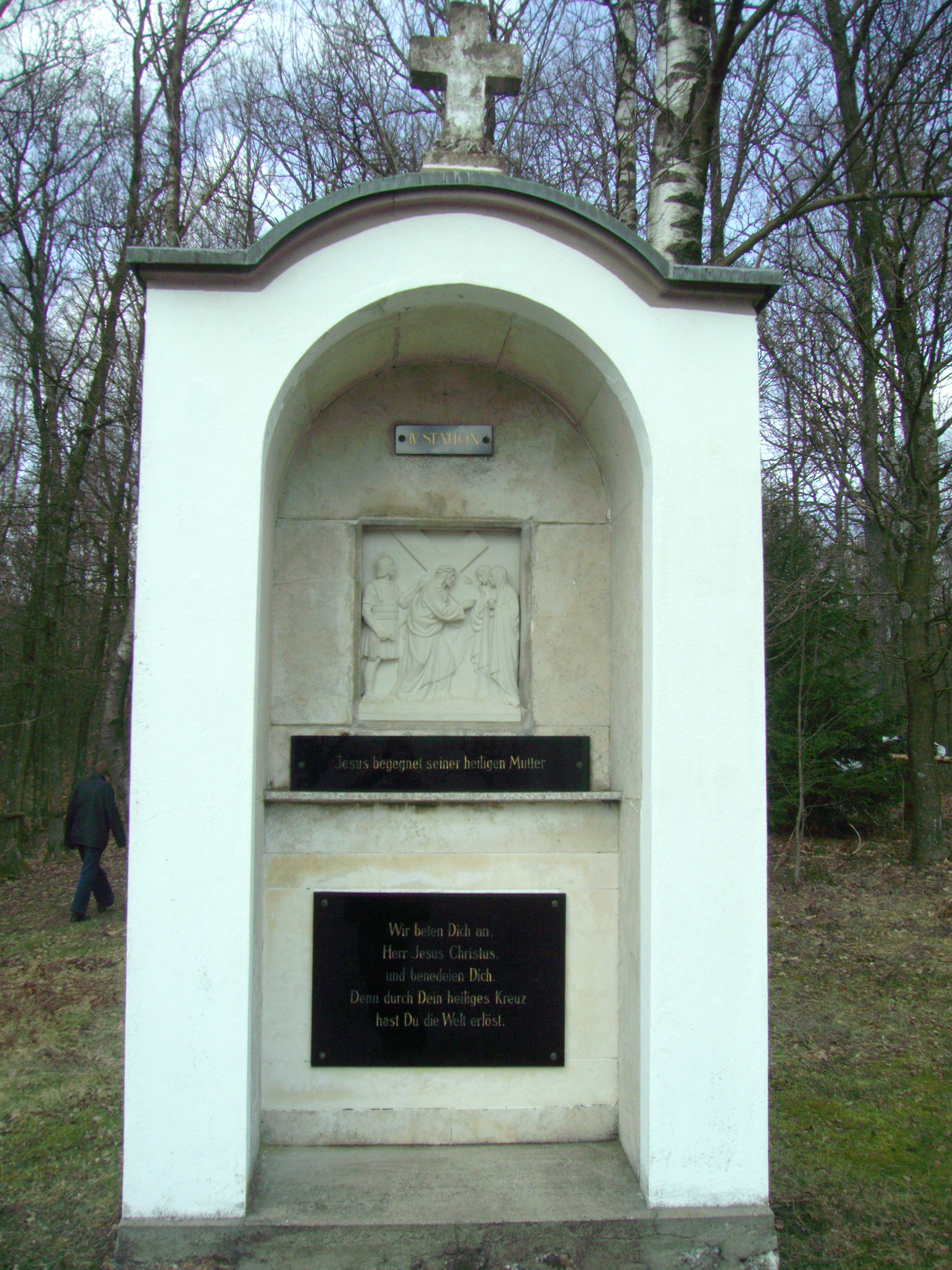 Station 4 des Kreuzwegs an der Pfarr- und Wallfahrtskirche Mariä Heimsuchung Kohlhagen. Inschriften: IV. Station Jesus begegnet seiner heiligen Mutter Wir beten Dich an, Herr Jesus Christus, und benedeien Dich. Denn durch Dein heiliges Kreuz hast Du die Welt erlöst.